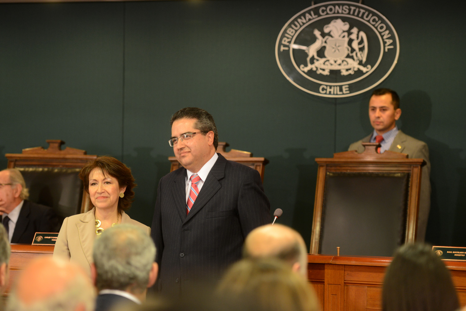 Ministro Álvaro Elizalde asiste a la asunción del nuevo presidente del Tribunal Constitucional